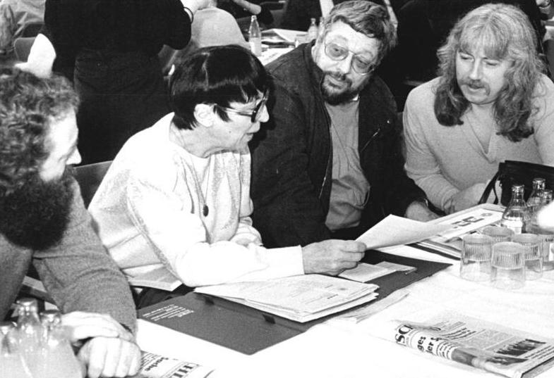 Berlin, Komponisten-Kongress ADN-ZB Zimmermann 12.2.87-A Berlin: Komponisten-Kongreß Pausengespräch während des Kongresses des Verbandes der Komponisten und Musikwissenschaftler der DDR zwischen (v.r.n.l.) den Komponisten Reinhard Lakomy, Reiner Bredemeyer, Prof. Ruth Zechlin und dem Musikwissenschaftler Dr. Gerd Belkius. Abgebildete Personen: Lakomy, Reinhard: Sänger, Komponist, DDR (GND 121996468) Zechlin, Ruth: Komponistin, Cembalistin, Dozentin an der Hochschule für Musik, DDR